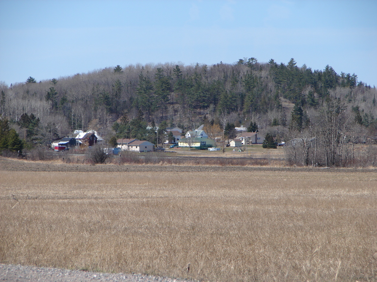 Desbarats, Ontario, Canada